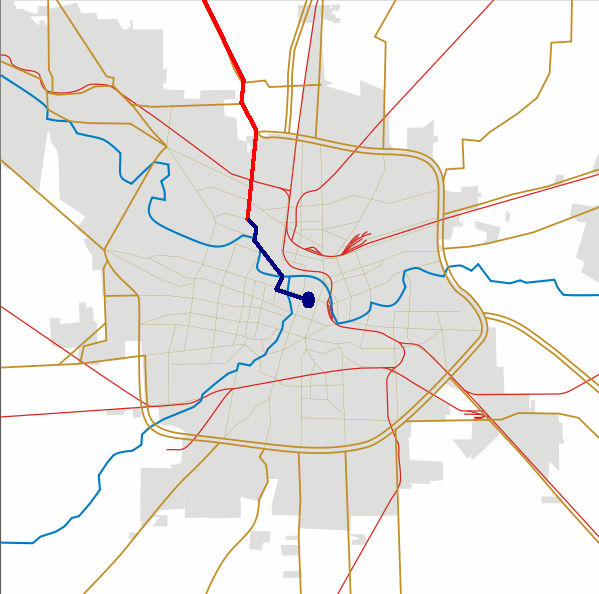 Demarcación de el acceso al centro de la ciudad de Córdoba, Argentina, a través de la Av.M.P.Cabrera